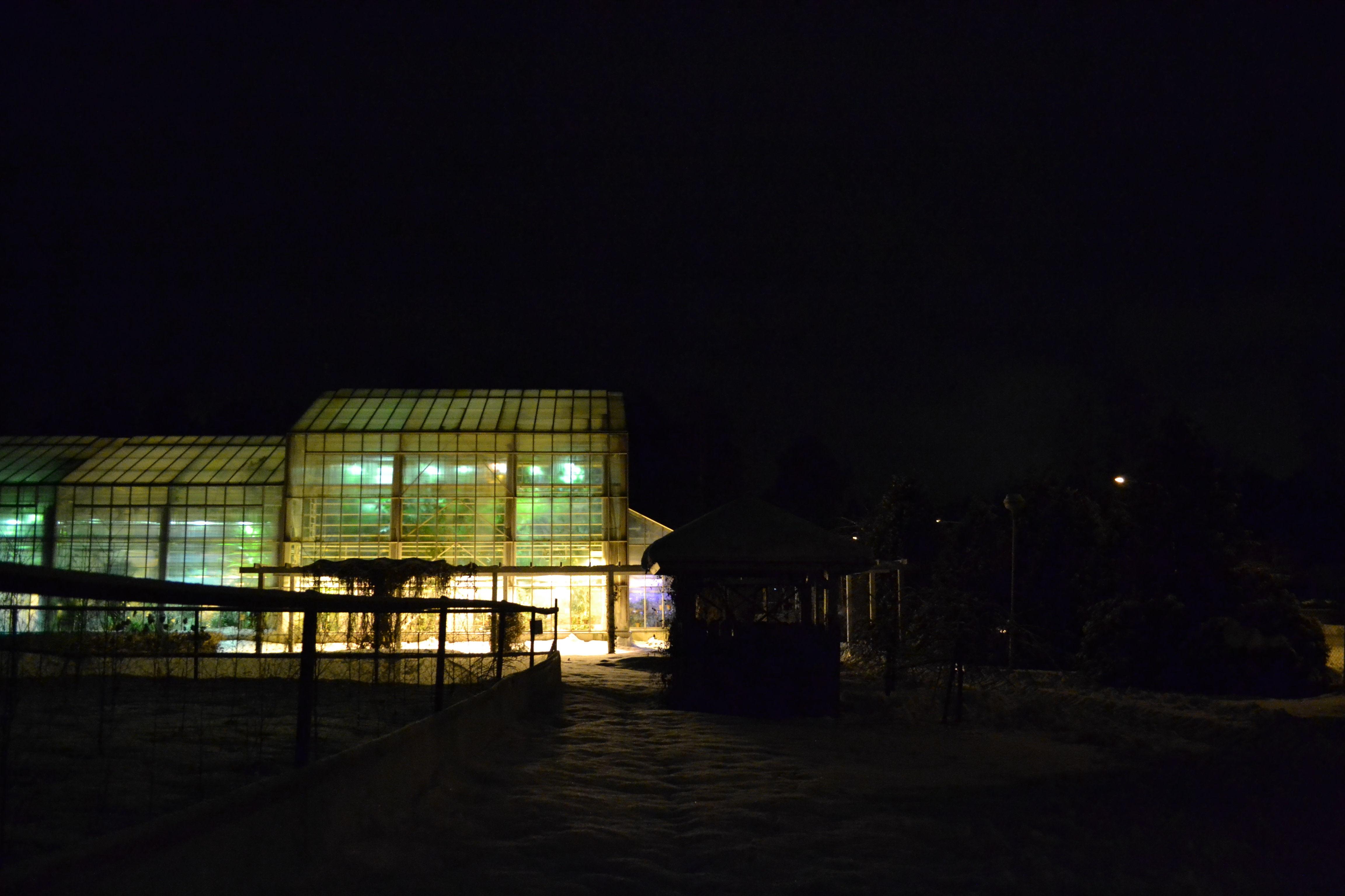 Botanian kasvihuoneet loistavat valoa talven 2013 pimeyteen